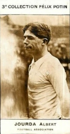 Jourda, Albert